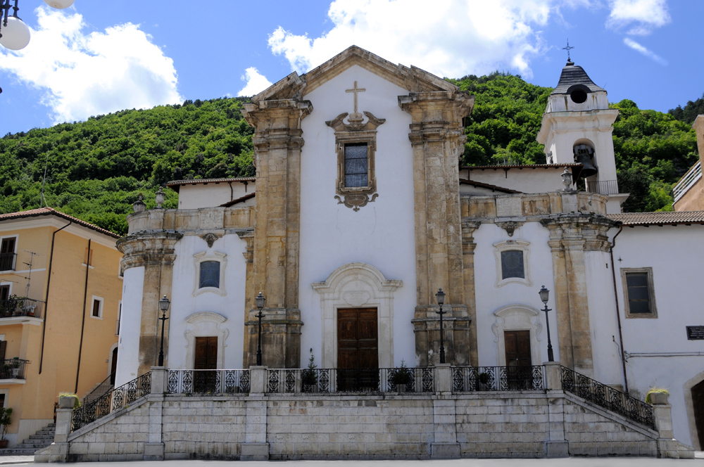 chiesa di San Giovanni Battista, la Chiesa principale del paese